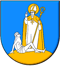 Herb gminy Raba Wyżna.